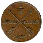 Klave på svensk 1/2 Skilling från 1820.